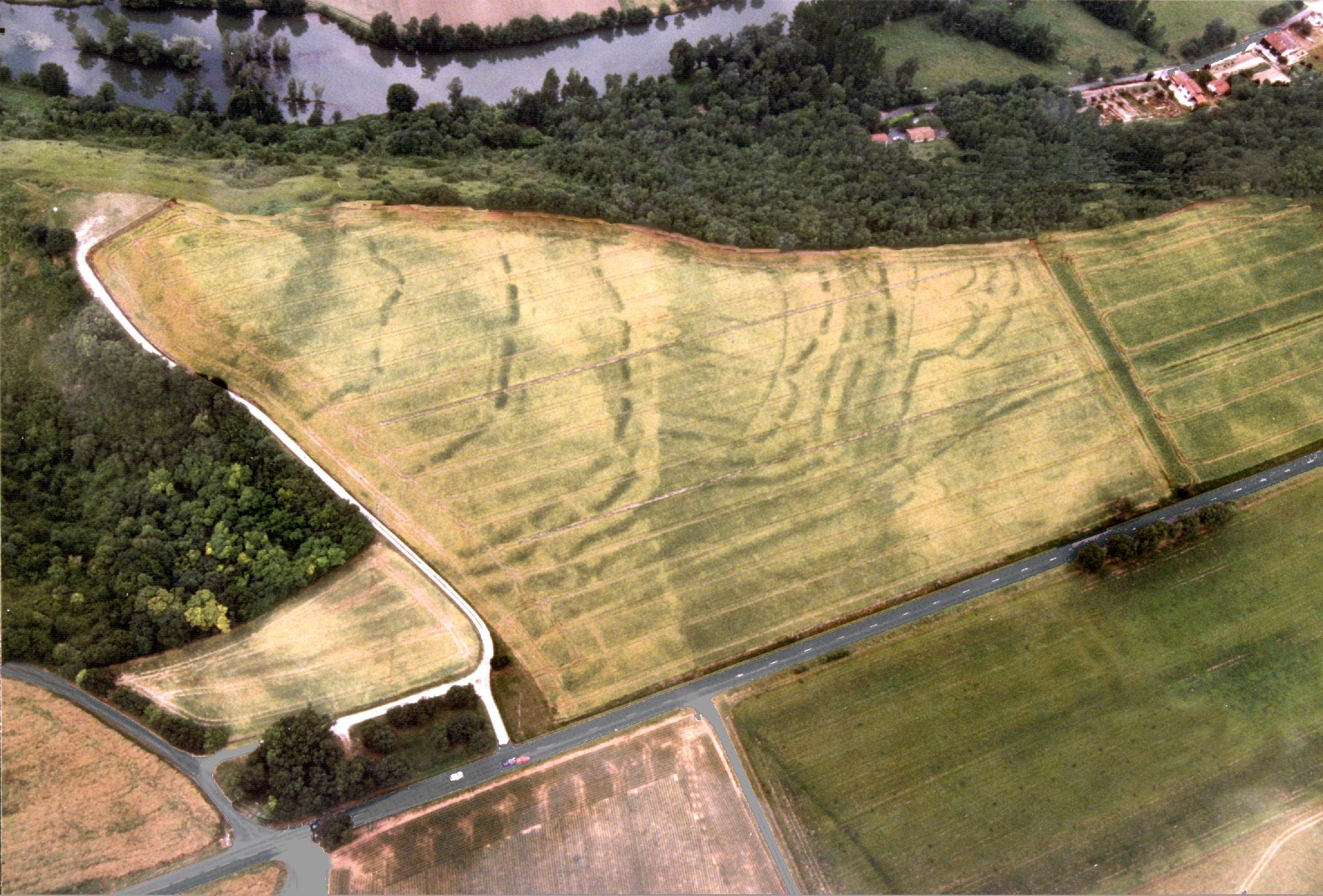 photo aérienne de BALZAC (16) Les Coteaux de Coursac. Période néolithique. Ensemble complexe de fossés dee défense d'un éperon barré dominant la Charente. Ces ensembles de fossés avec portes et chicanes complexes étaient destinés à protéger une zone susceptible d'accueillir une population de cueilleurs-chasseurs fraîchement sédentarisés, grâce au climat régional et aux céréales sauvages.